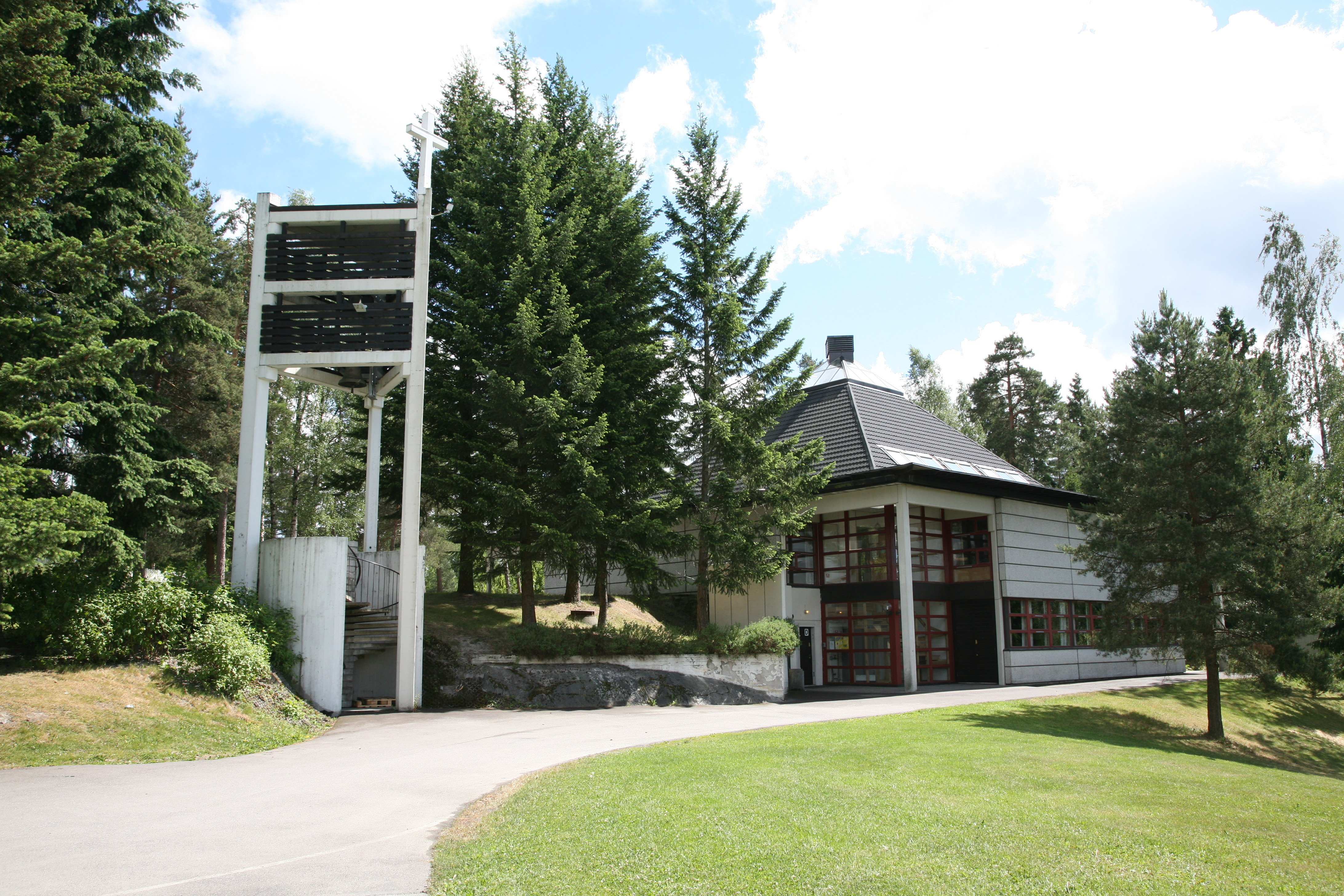 Skårer church in Lørenskog, Akershus, Norway